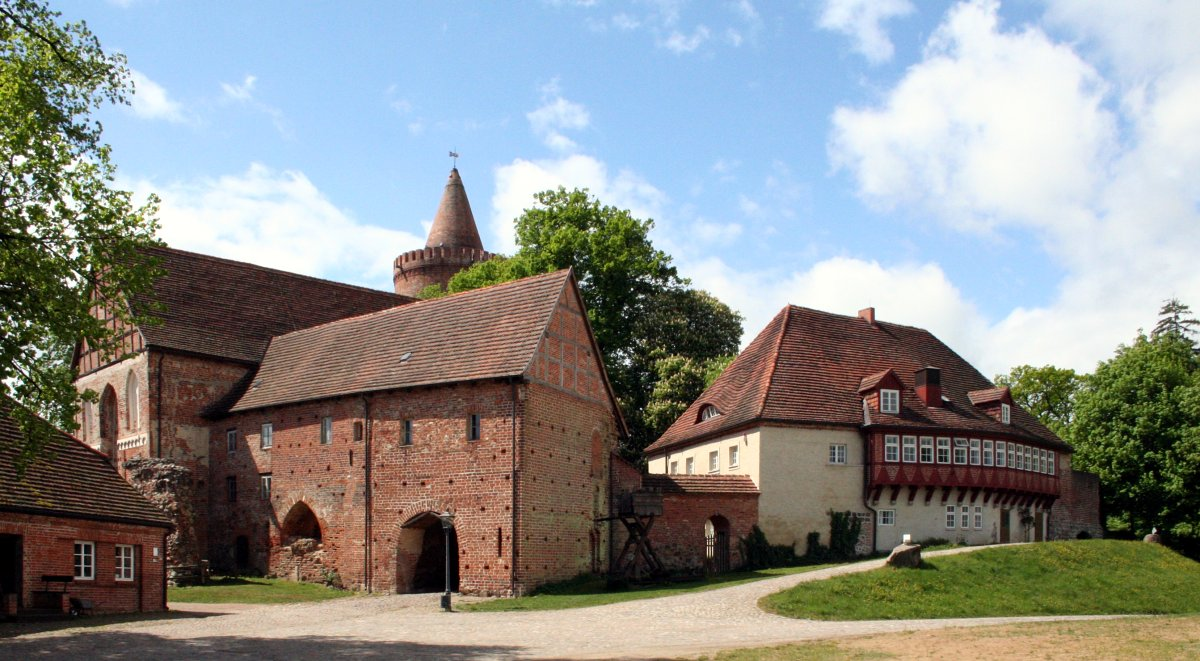 Amtsreiterhaus (links), Burgkapelle und Neues Tor (Mitte) sowie Münzprägerei (rechts) der Burg Stargard.